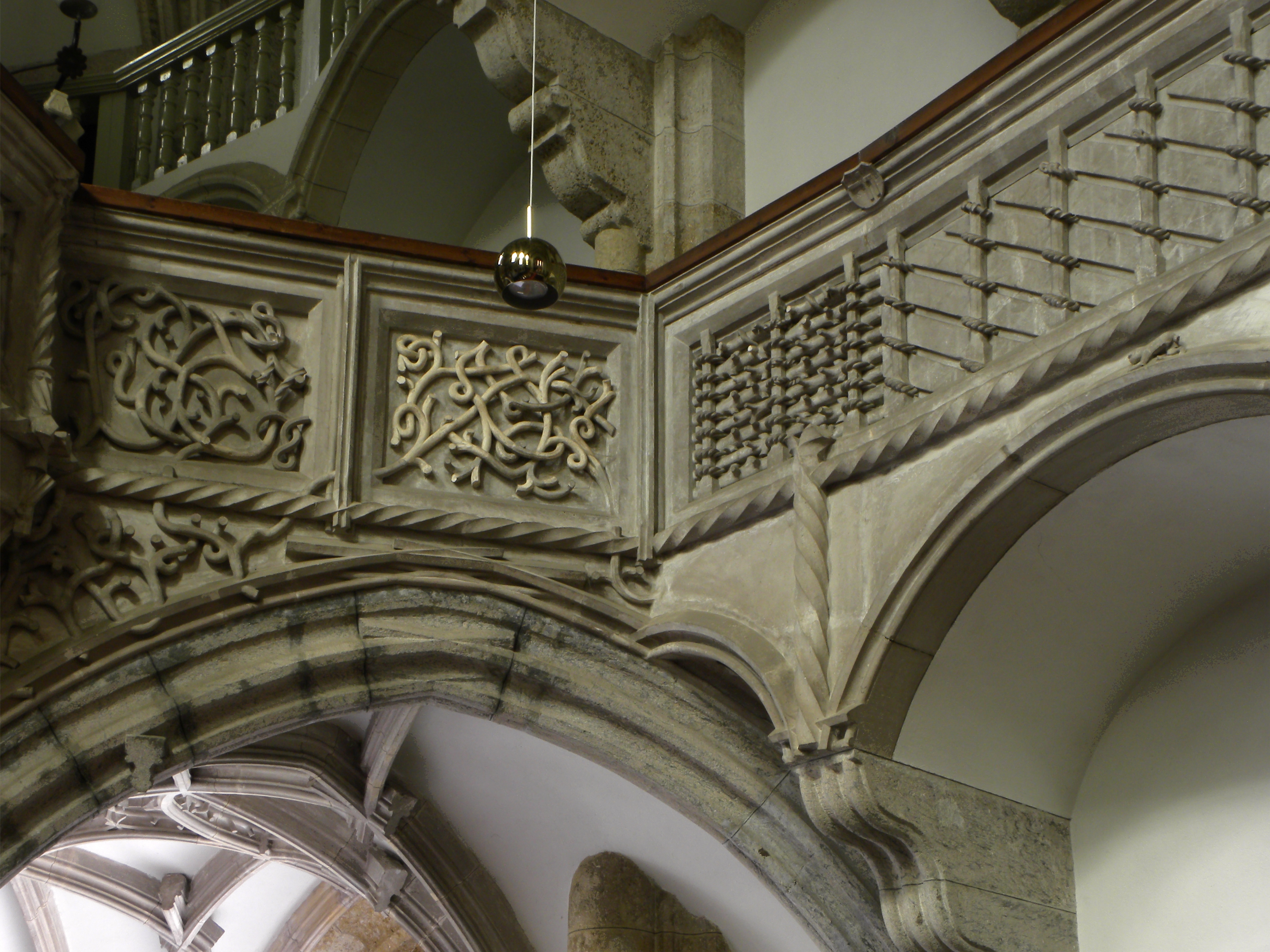 Luthersche Symbolik in der Kirchenfestungsanlage hl. Oswald